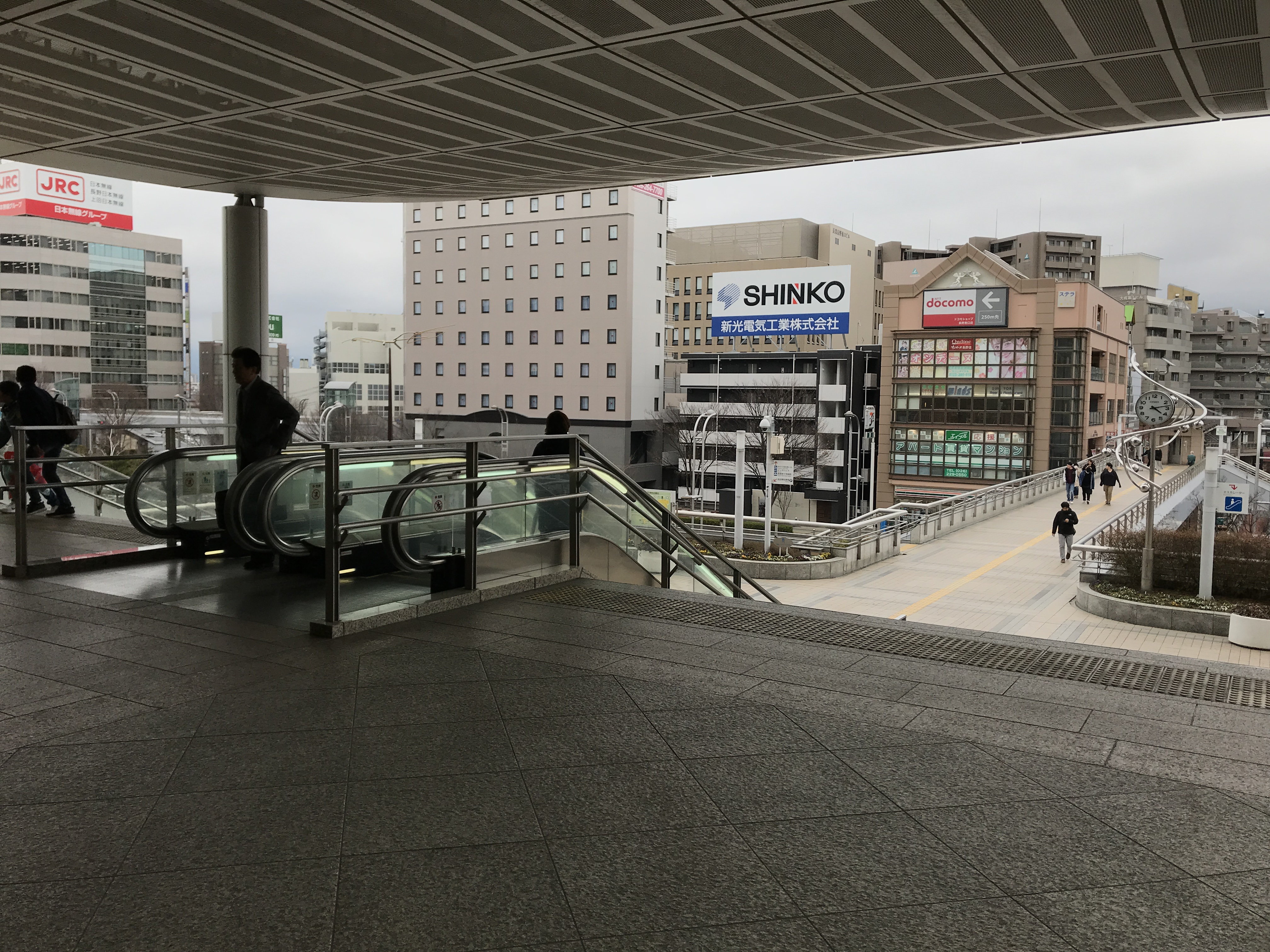 長野駅東口から見た、街並み。